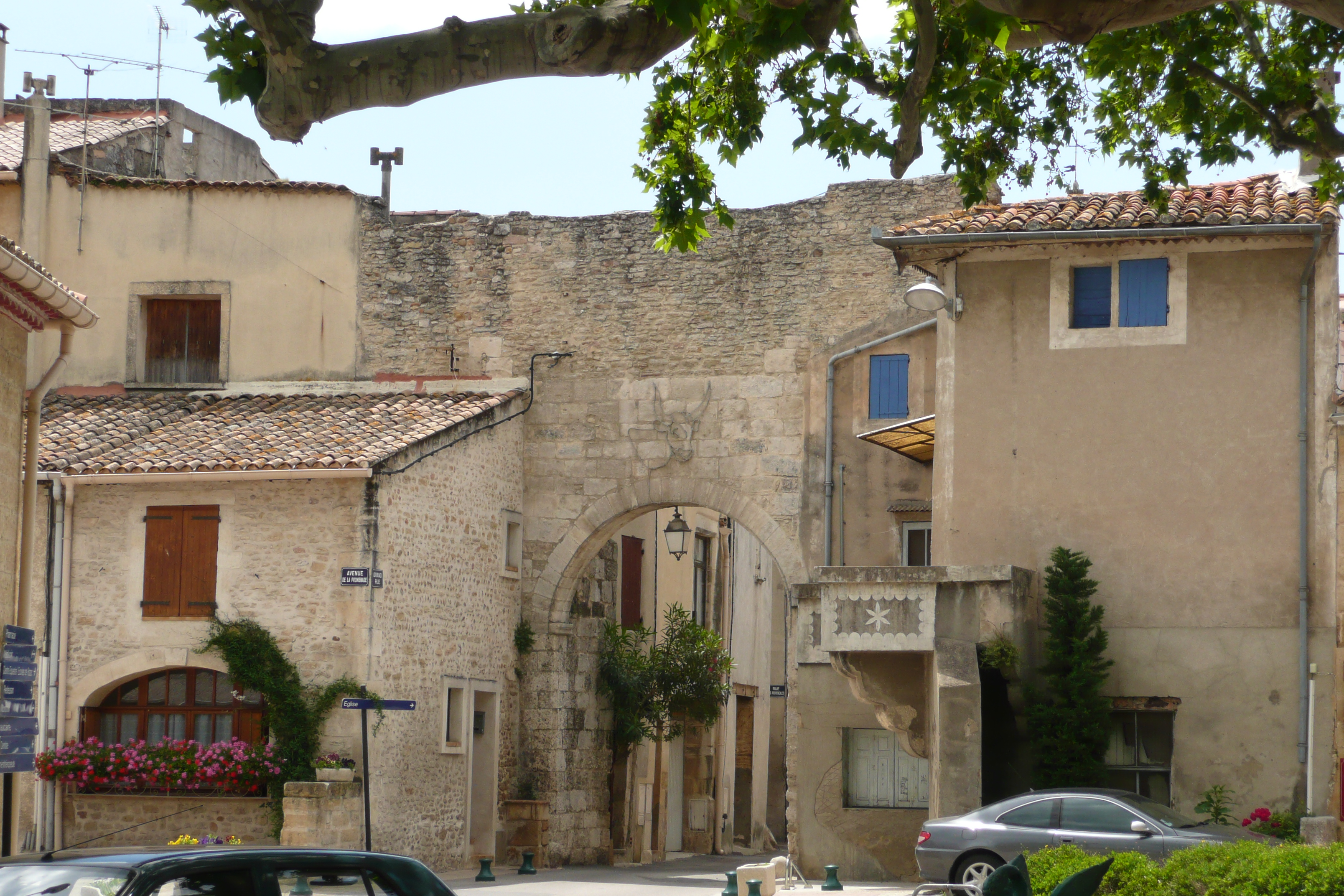 Portes à Meynes.